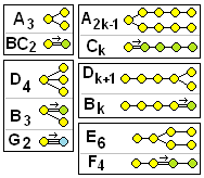 Dynkin diagram foldings